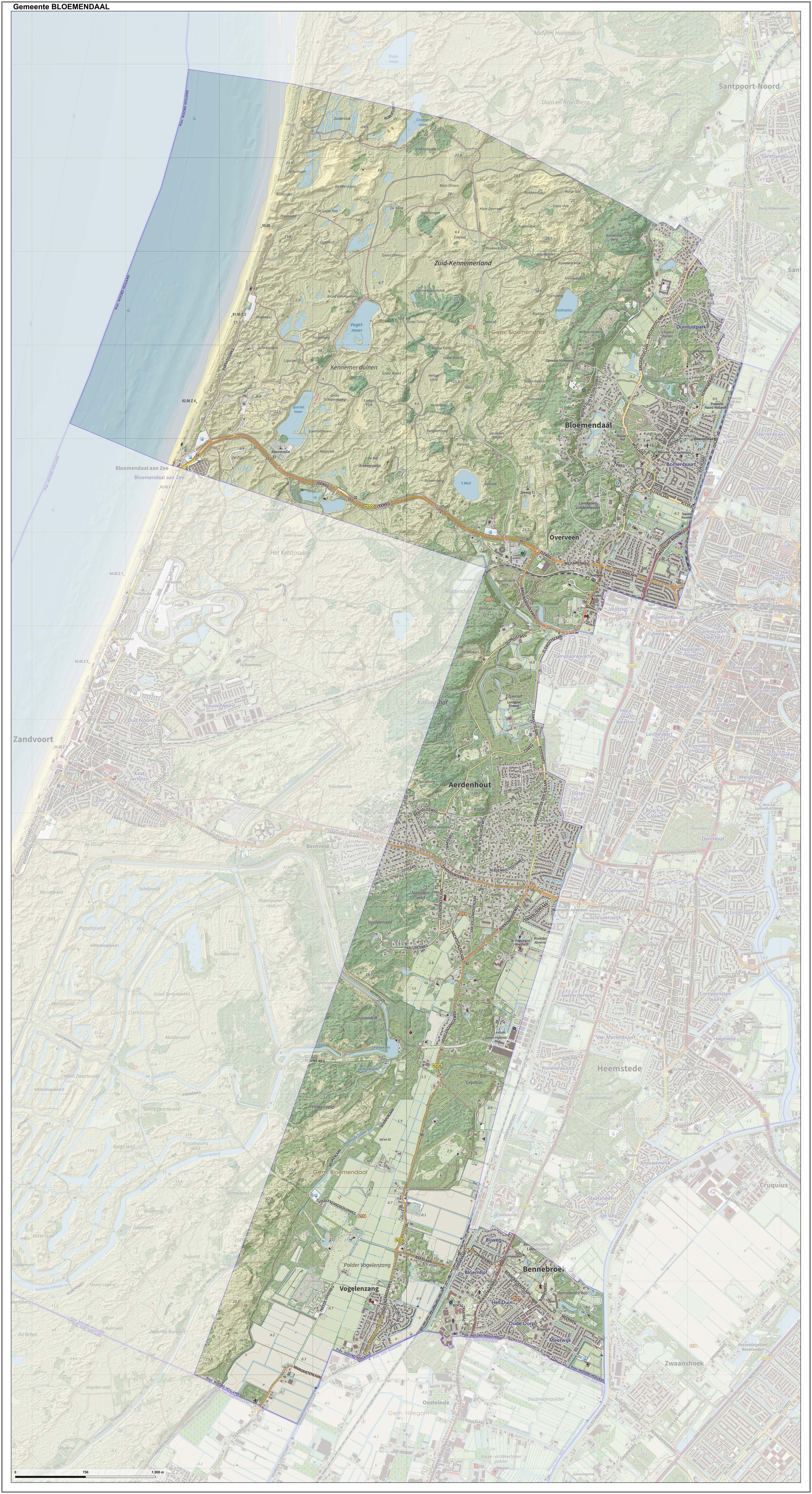 Topografische gemeentekaart. Resolutie: 400 pixels/km. Kaartbeeld samengesteld uit de open geodata van de Top10NL en Top25namen (Kadaster), Creative Commons-BY licentie. Gebouwvlakken uit open geodata BAG extract. Wegen uit de OpenStreetMap, OpenStreetMap community. Reliëfschaduw uit de Actuele Hoogtekaart AHN2. Samenstelling en kleurenschema: Jan-Willem van Aalst, met QGIS. Zie ook de Legenda.